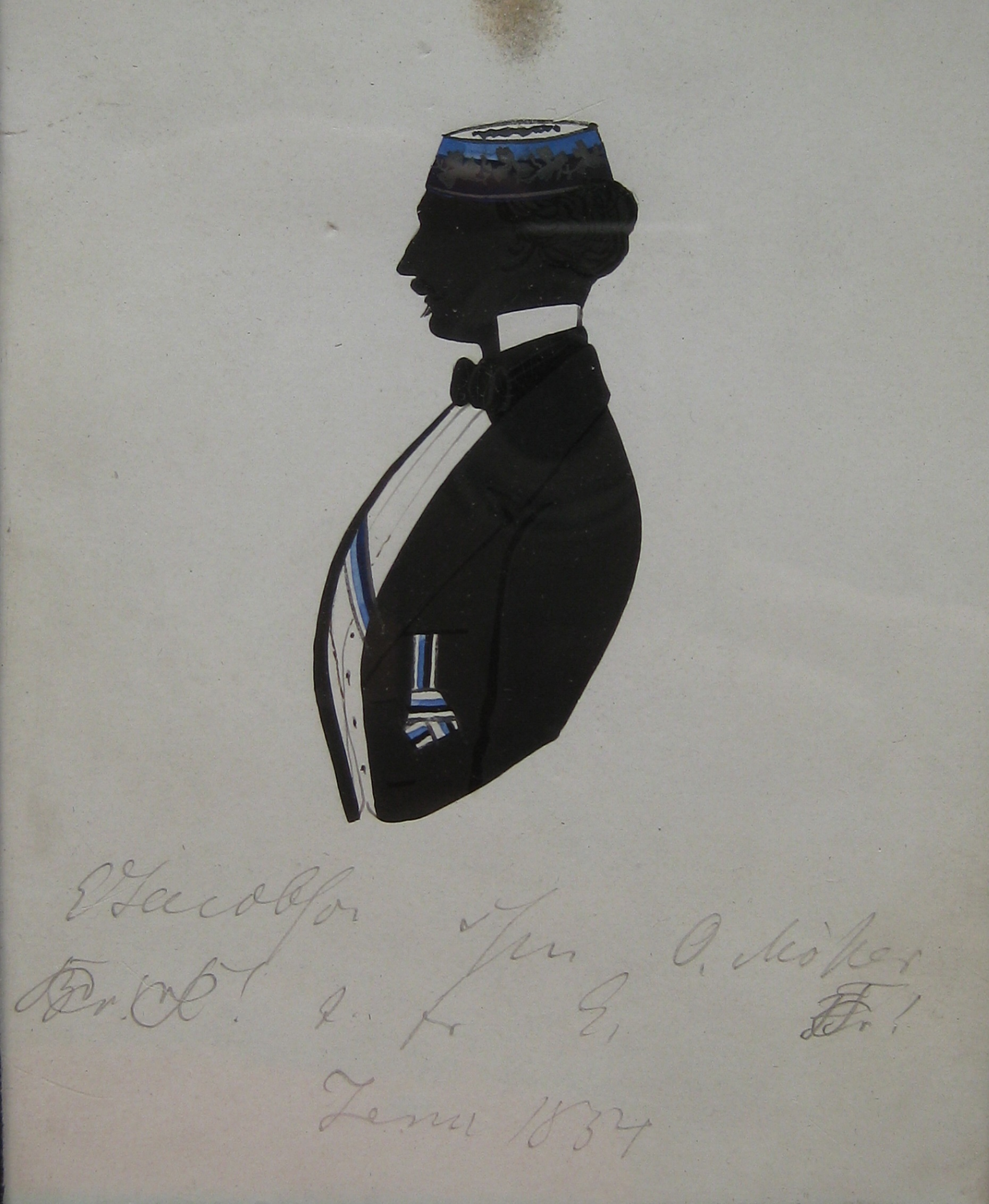 Silhouette von Emil Jacobson, Angehöriger der Corps Baltia Königsberg und des Corps Saxonia Leipzig